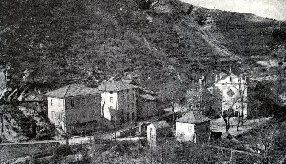 La località e il santuario di Nostra Signora delle Tre Fontane nel primo Novecento, Montoggio, Liguria, Italia